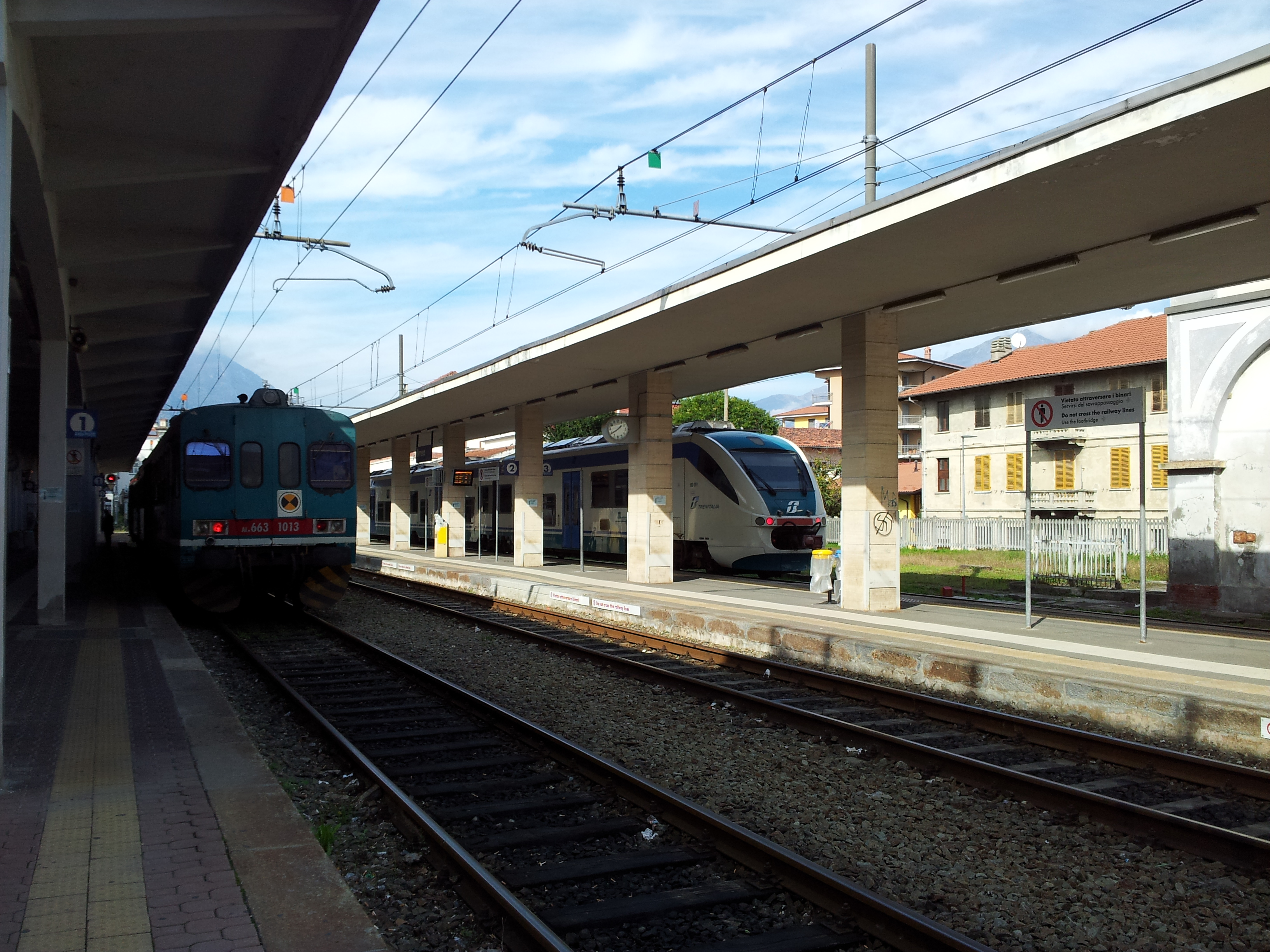 Stazione lato binari. In sosta una coppia di Aln 663 al binario 1 (in partenza per Aosta) e un Minuetto al binario 3 (arrivato d'Aosta, ma pronto a ripartire in quella direzione per l'ora successiva).